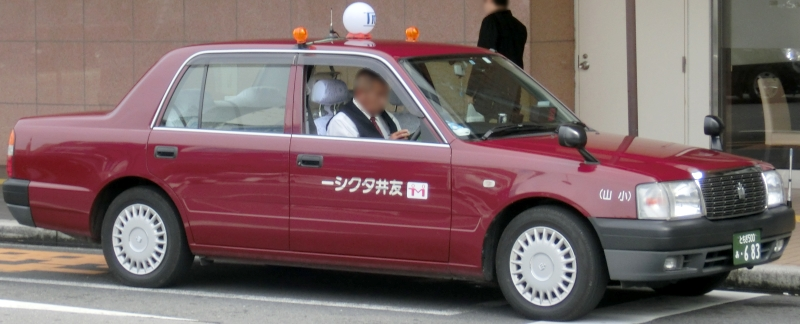 友井タクシーのクラウンコンフォート